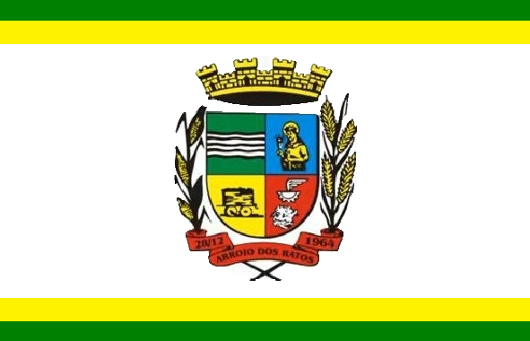 Bandeira do município de Arroio dos Ratos